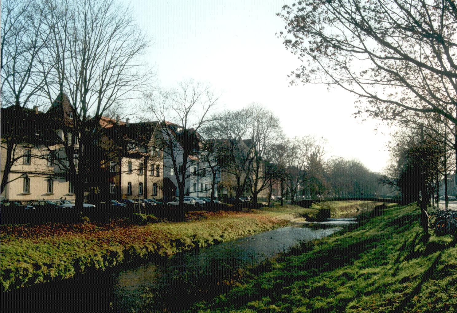 Novemberstimmung an der Steinlach in Tübingens Südstadt.